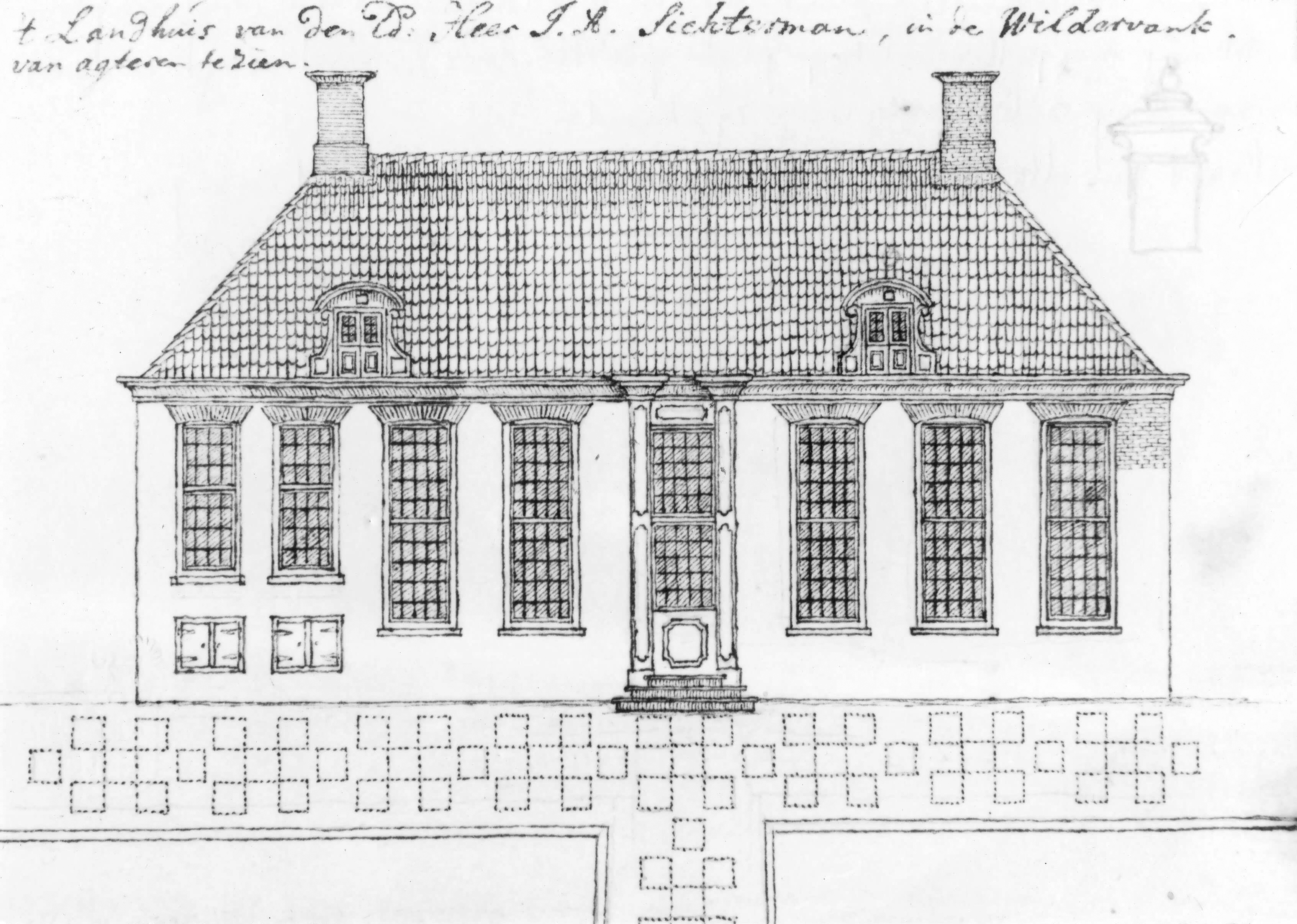 Wildervank : Achterzijde van het landhuis van de heer J.A. Sichterman